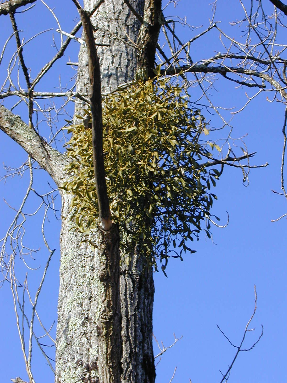 Viscum album, Populus sp.